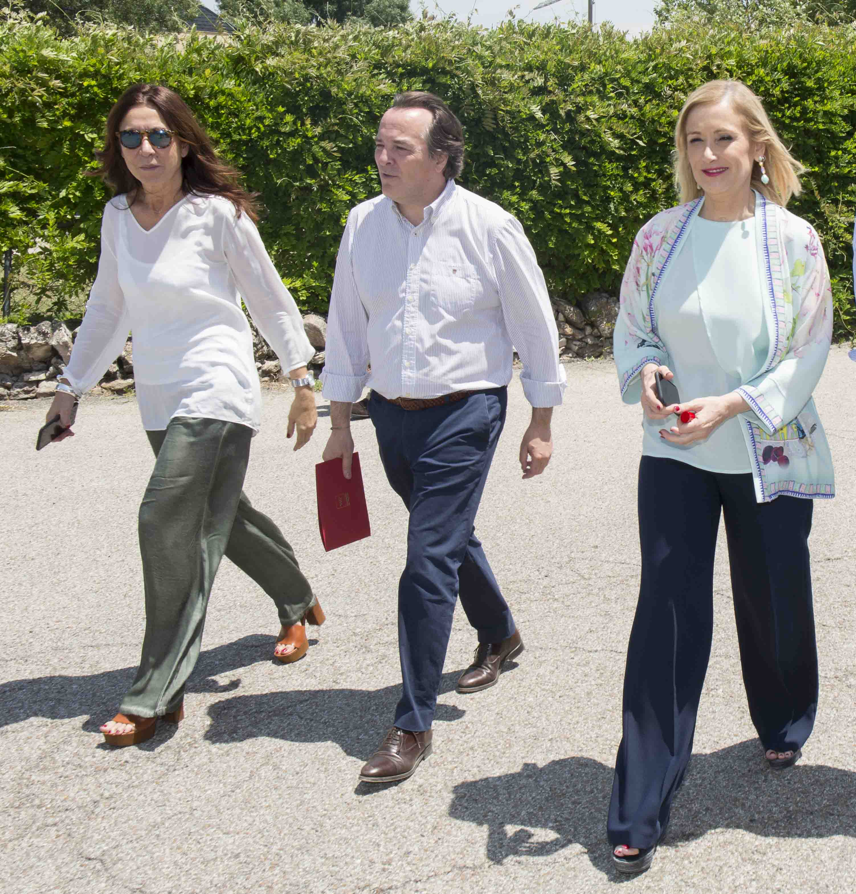 Acompañada de Ángel Garrido y Jaime González Taboada, he mantenido un encuentro, en Guadalix de la Sierra con alcaldes y portavoces de la zona.